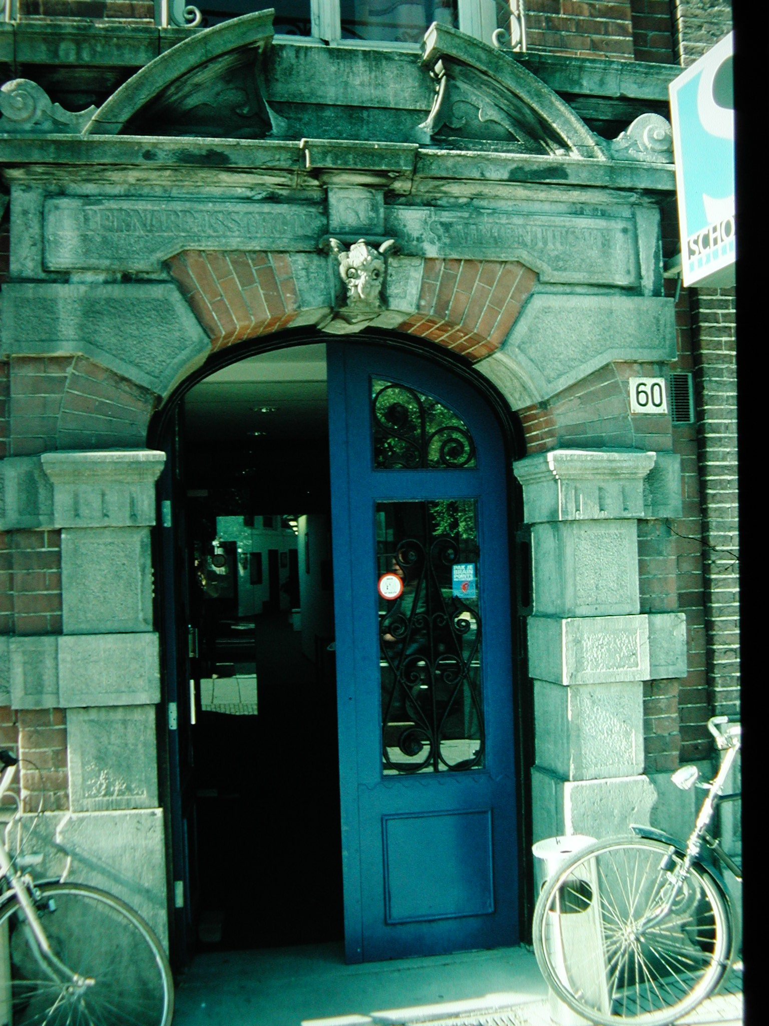 Poortje Sint-Bernardusschool, Stadhouderskade, Amsterdam. Gebouwd in 1880. De eigenlijke school lag op het achterterrein. Onderdeel van de Rooms-katholieke Vincentiusscholen, gerund door de Broeders van Maastricht. Foto: 1999. Auteur: P.H.Louw, eigen werk, vrij voor gebruik. Categorie:Afbeelding Amsterdam